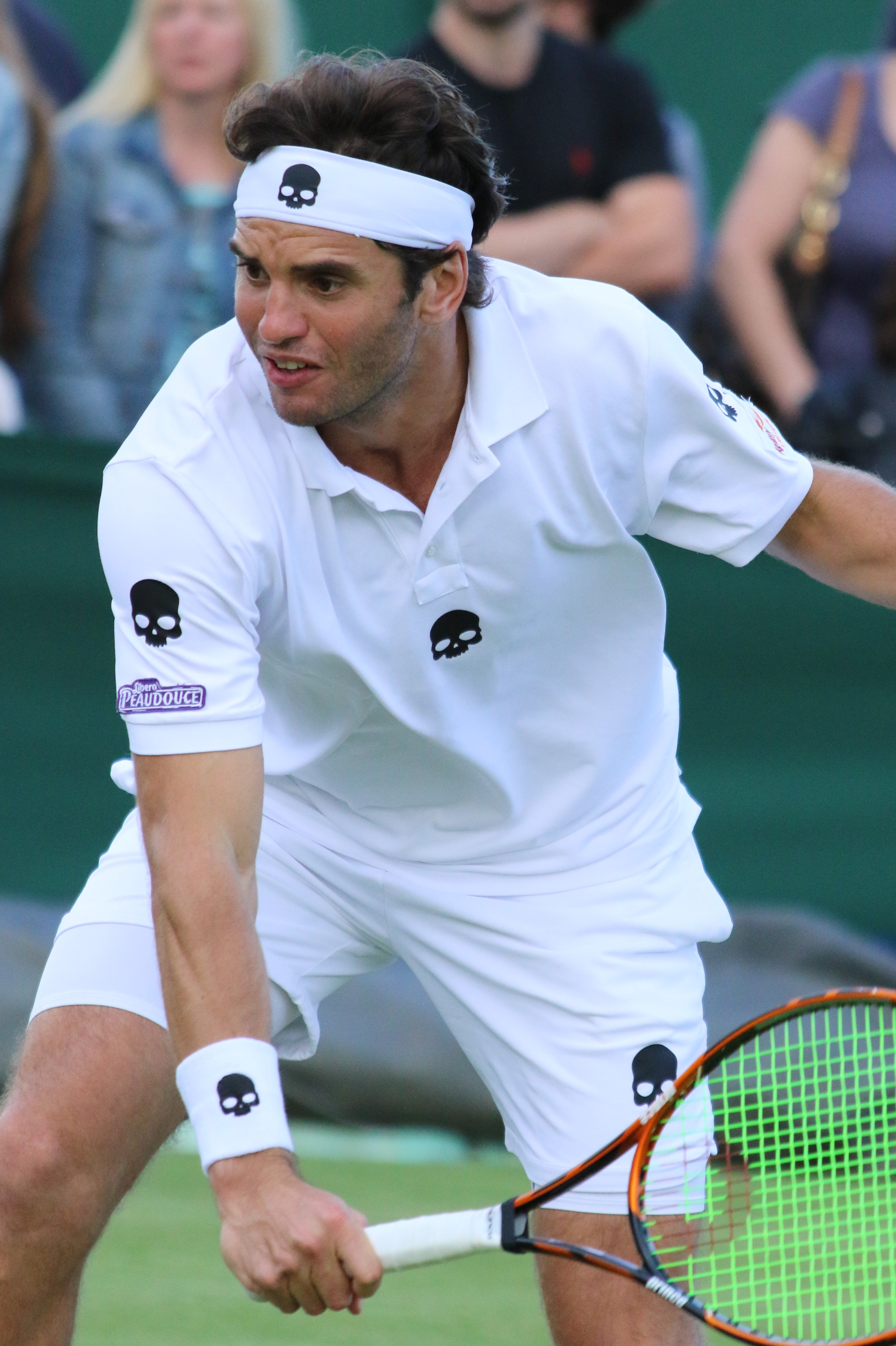 Jaziri WM16 (11)